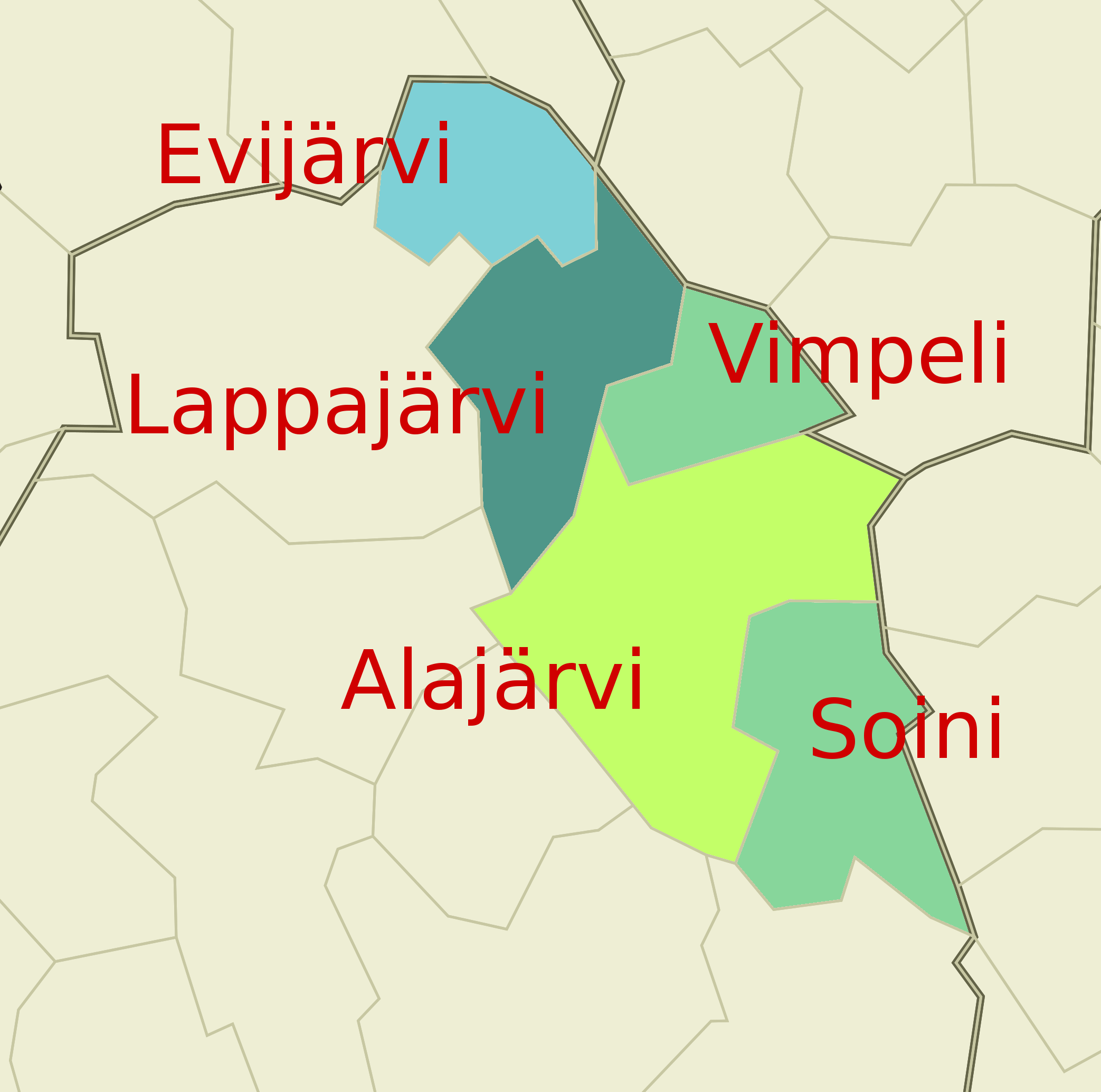 Järviseudun seutukunnan kunnat kartalla. Pohjana käytetty Suomi.karttapohja.2013.svg -tiedostoa.